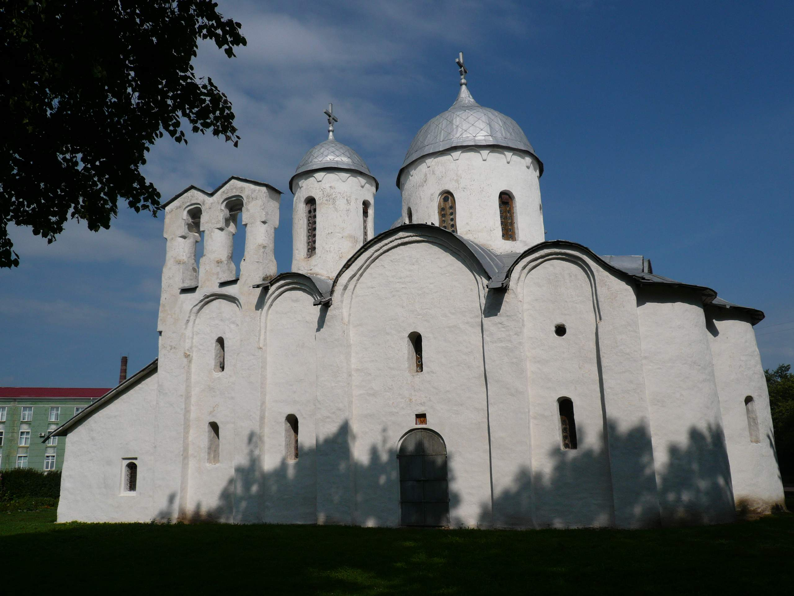 Cобор Иоанна Предтечи (Псковская область, Псков, улица Горького,1)